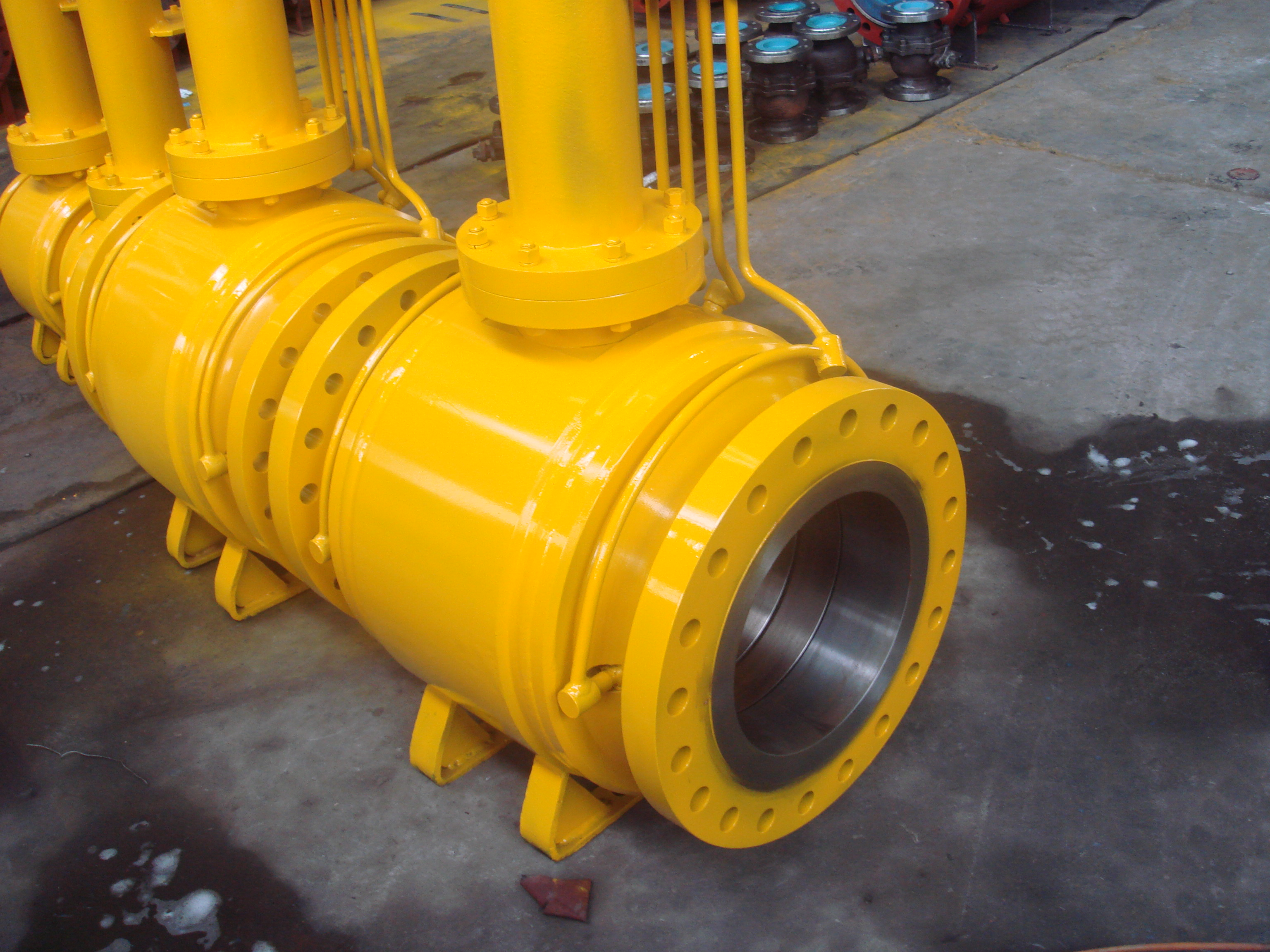 Valves made from monel metal.